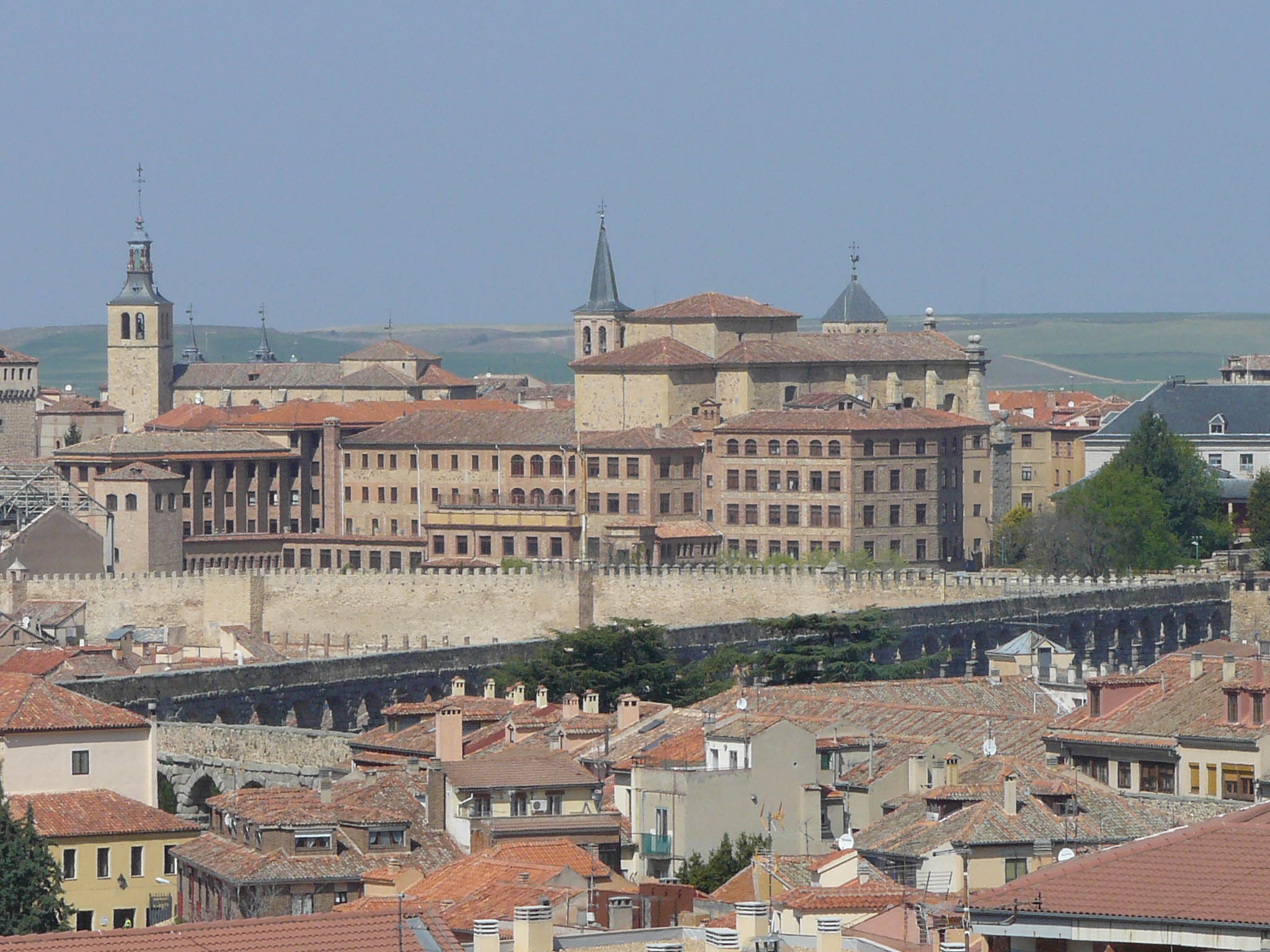 Vista del conjunto del seminario e iglesia de la Compañía de Segovia